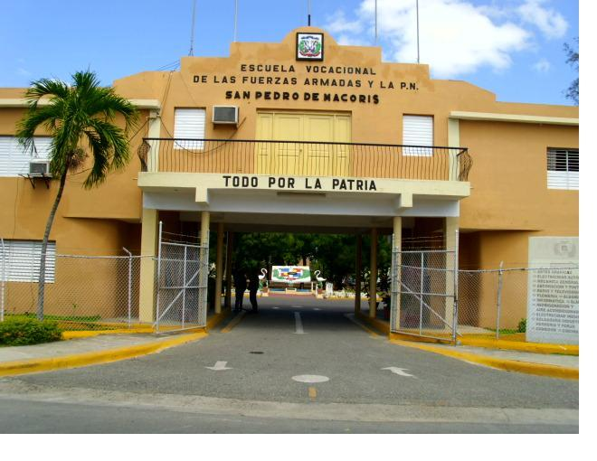 escuela basica barrio kennedy